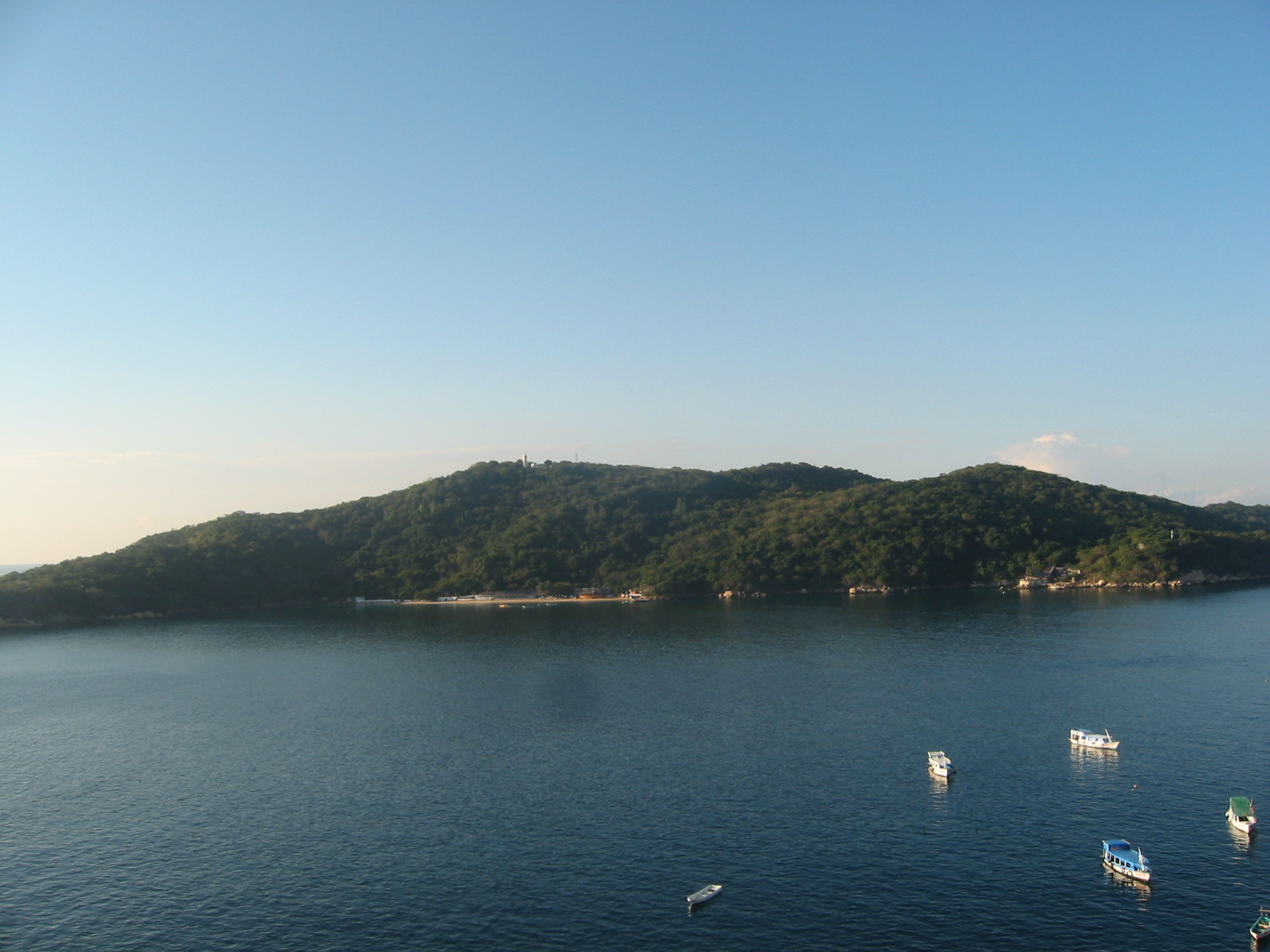 Isla La Roqueta en Acapulco, Guerrero|, México.